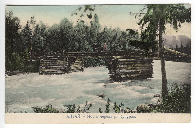 Мост через реку Кучерла, приток реки Катунь